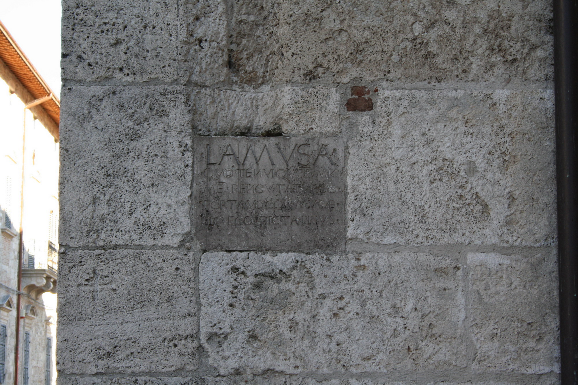 Porta della Musa, distico in latino, parete esterna sinistra Duomo Ascoli Piceno, esterno giorno, proprio scatto Sibilla.io "Utilizzo concesso" Ticket#2007040410014627 (ticket per le immagini) This file is licensed under Creative Commons 3.0 license